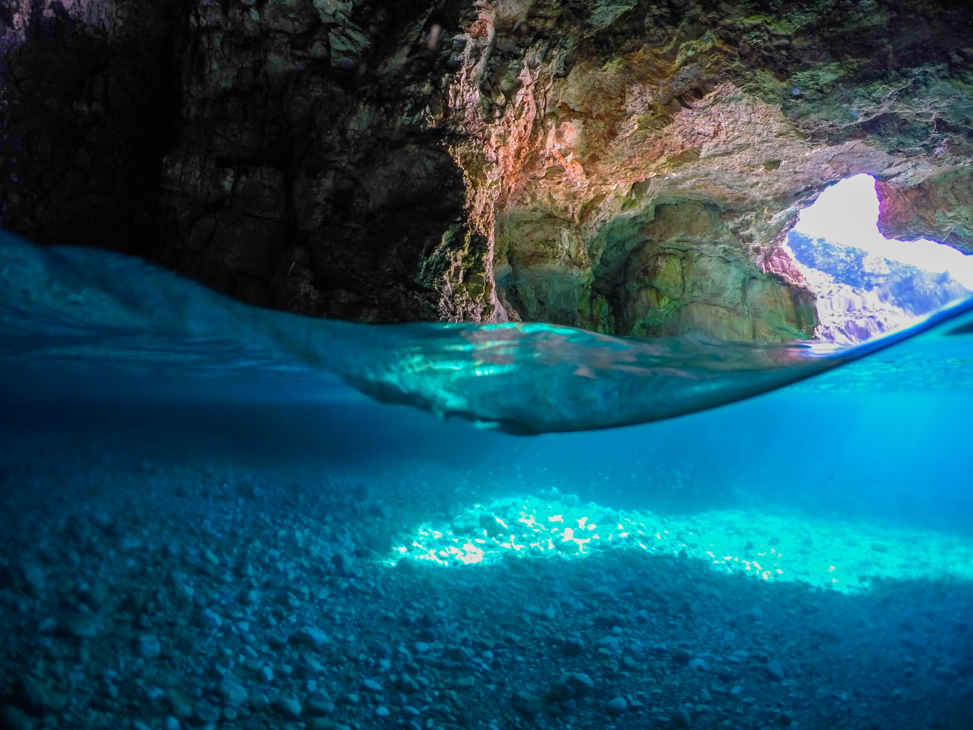 Karaburun, Vlore